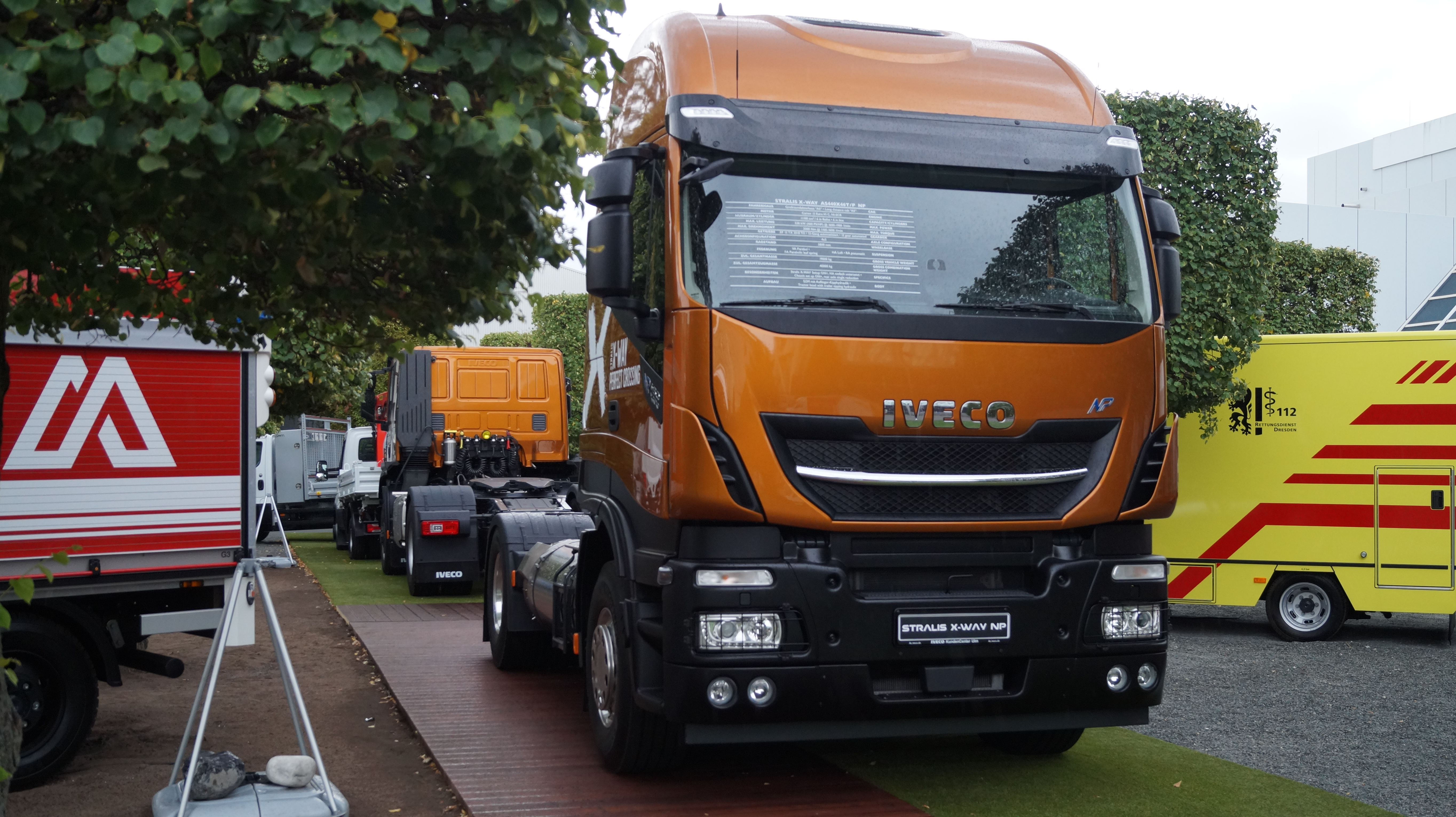 Schrägansicht der Front eines Iveco Stralis X-Way AS440X46T/P NP, ausgestellt auf der IAA 2018.